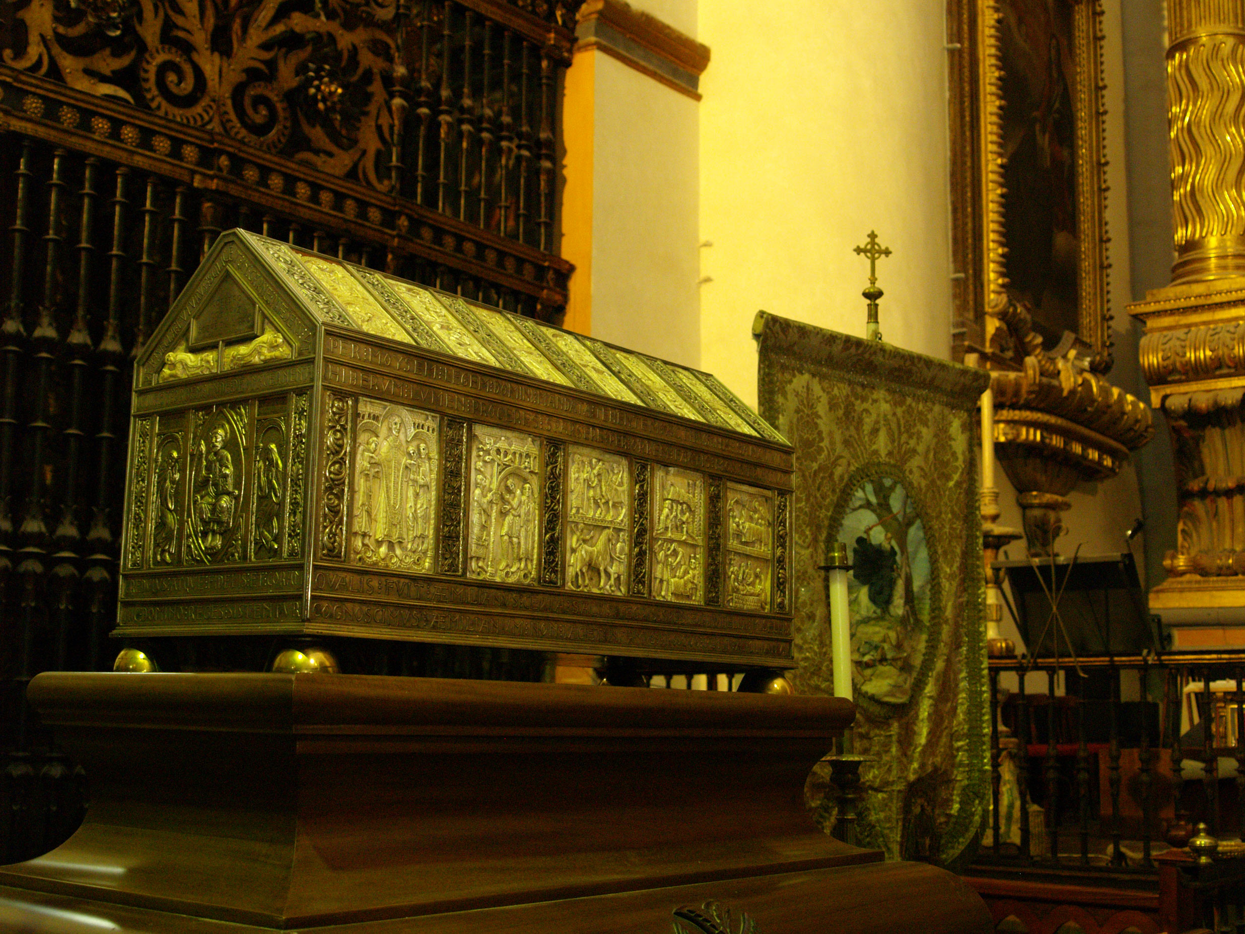 Arca relicario de San Millán de la Cogolla. Monasterio de Yuso. La Rioja. Patrimonio de la Humanidad